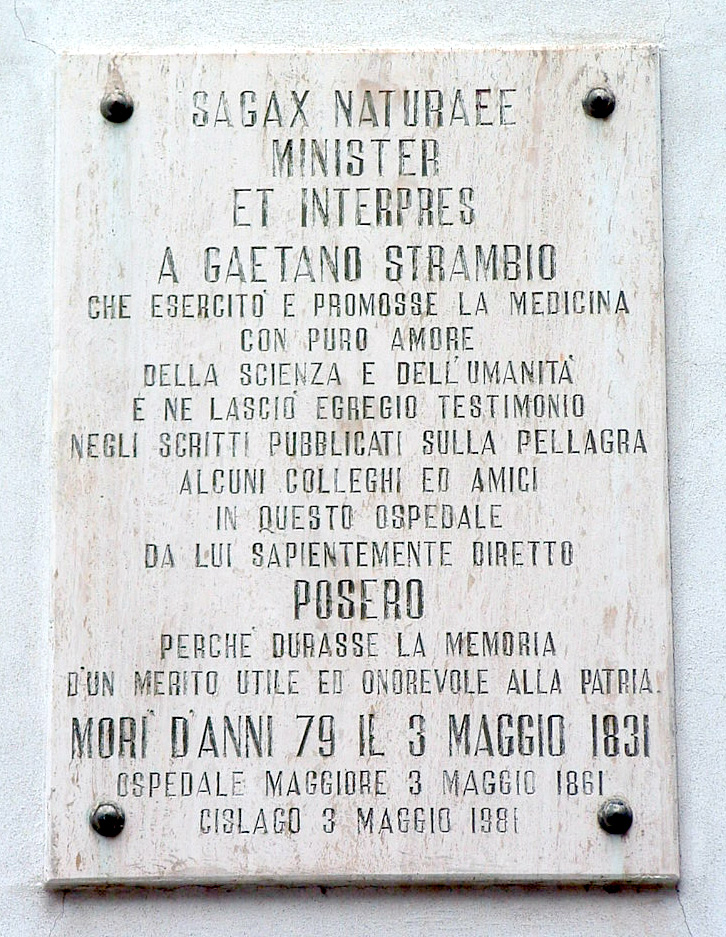 Targa commemorativa a Cislago (VA), Italia